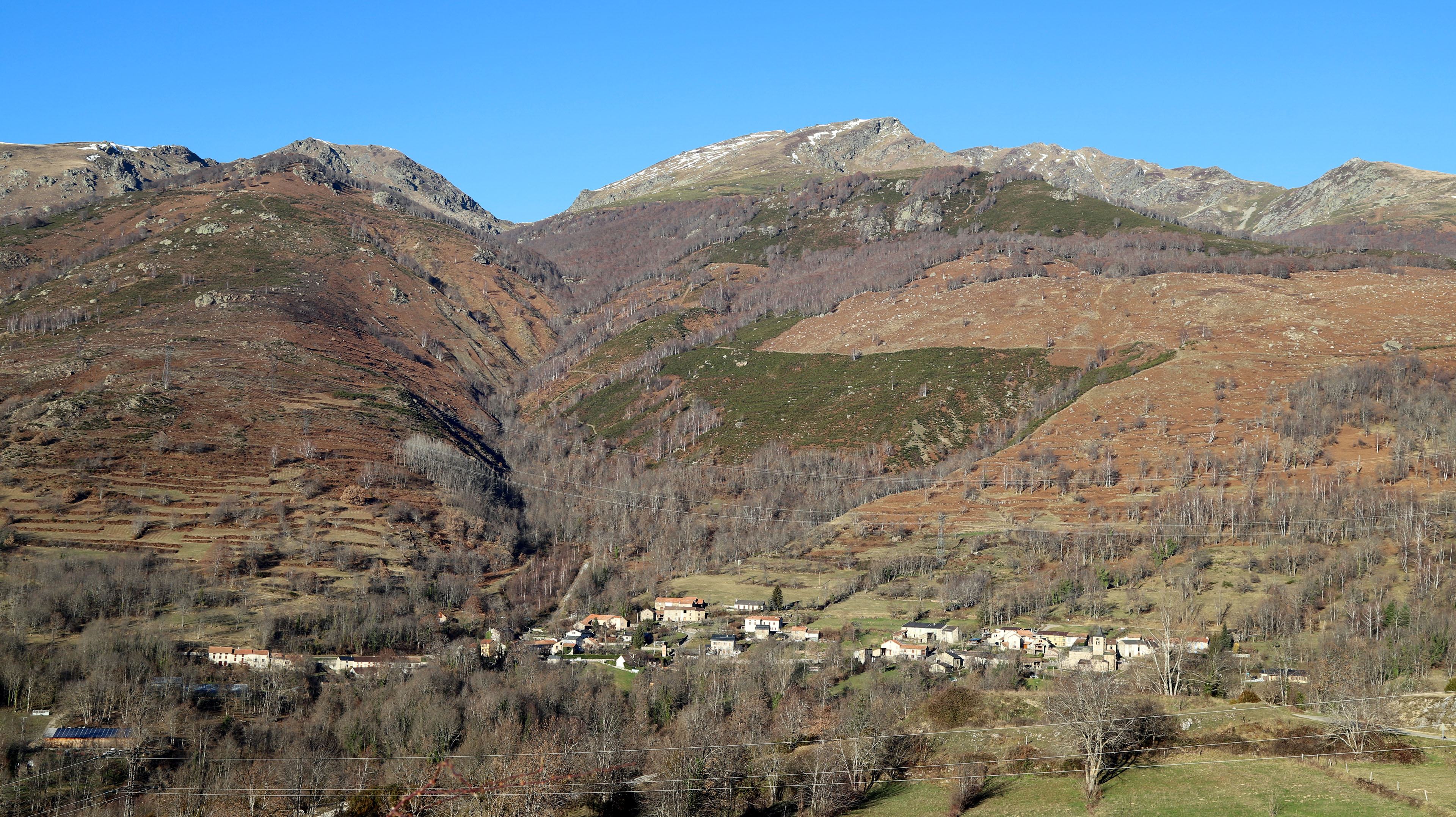 Vue générale